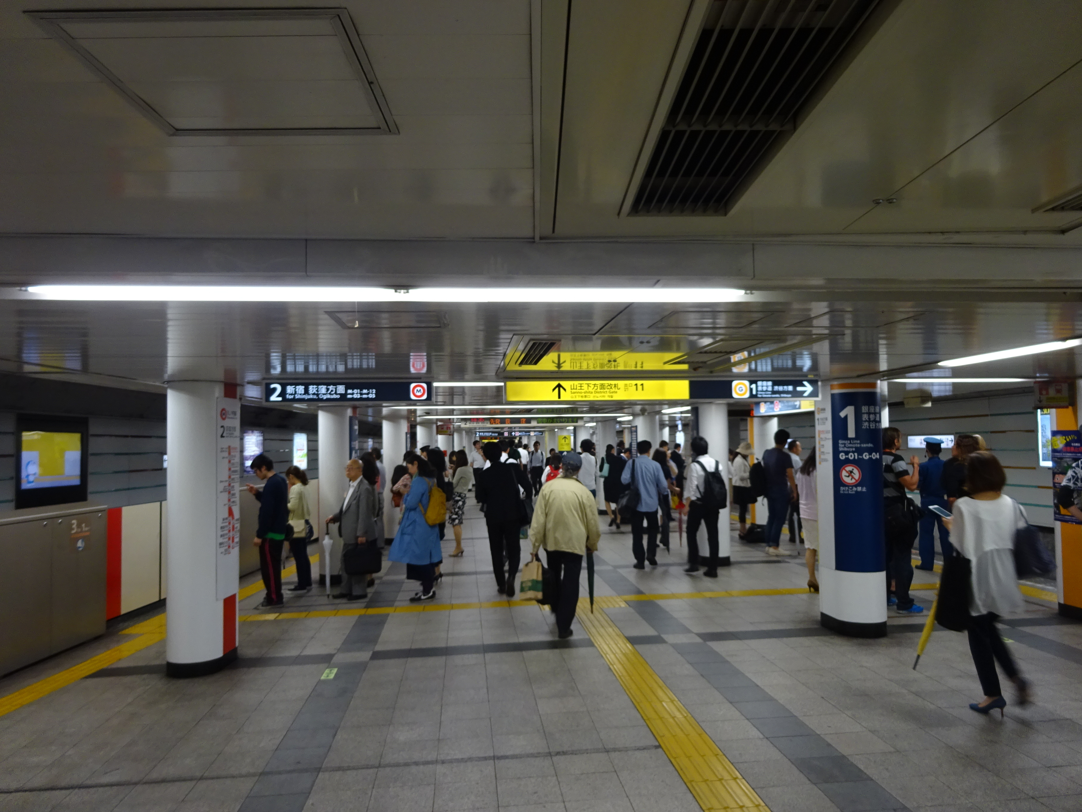 赤坂見附駅1・2番ホーム